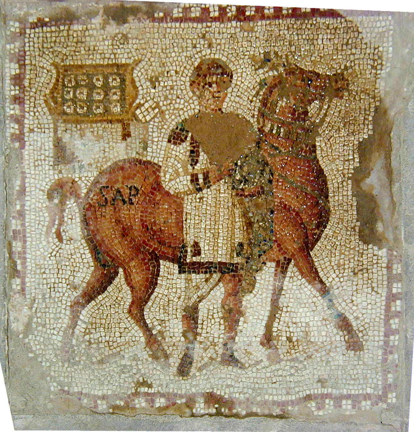 Panneau de la mosaique des chevaux de Carthage